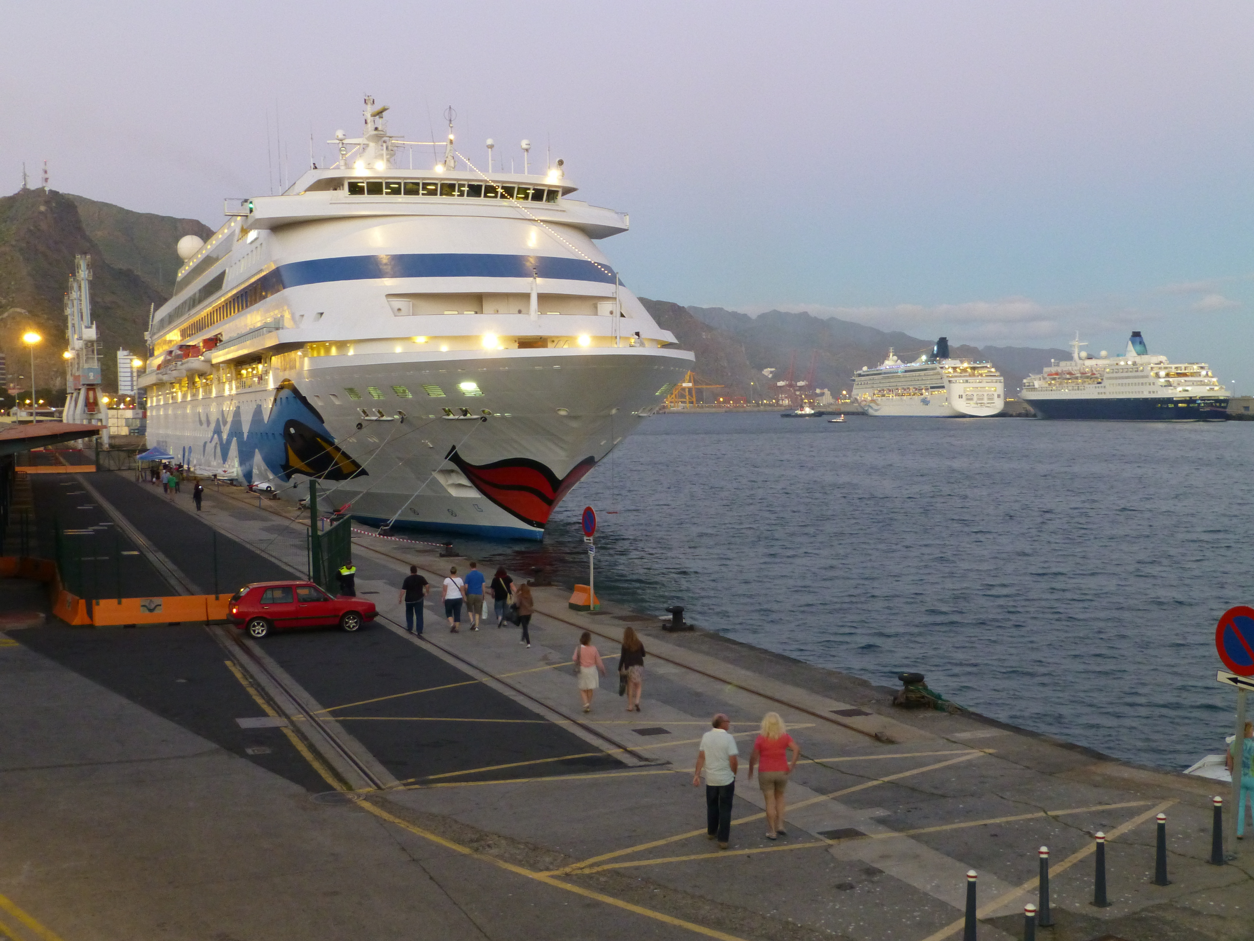 Grandes cruceros de turismo, atracados en el puerto de Santa Cruz de Tenerife (Islas Canarias, España), el día 12 de enero de 2013. A la izquierda, en el Muelle de Ribera, el buque AIDA Cara ("AIDAcara"), construido en 1996, IMO 9112789. Al fondo, en el Muelle Sur, el "Norwegian Spirit" (casco en blanco, ex-SuperStar Leo, año 1998), y el "Saga Sapphire" (con parte inferior del casco en color negro), construido en 1981 y bautizado entonces con el nombre Europa.